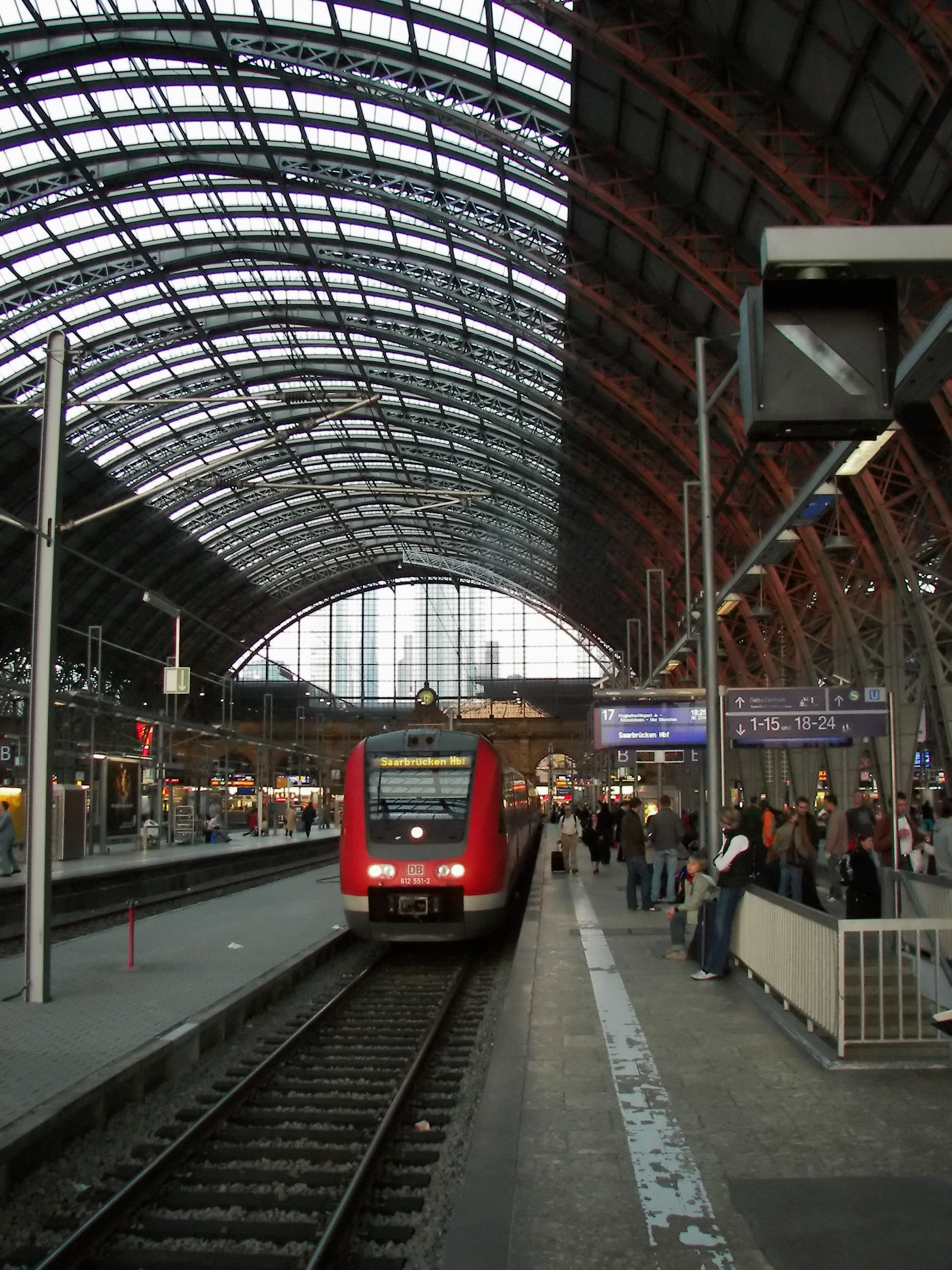 Frankfurt am Main, Hauptbahnhof mit Gepäckbahnsteig (links)